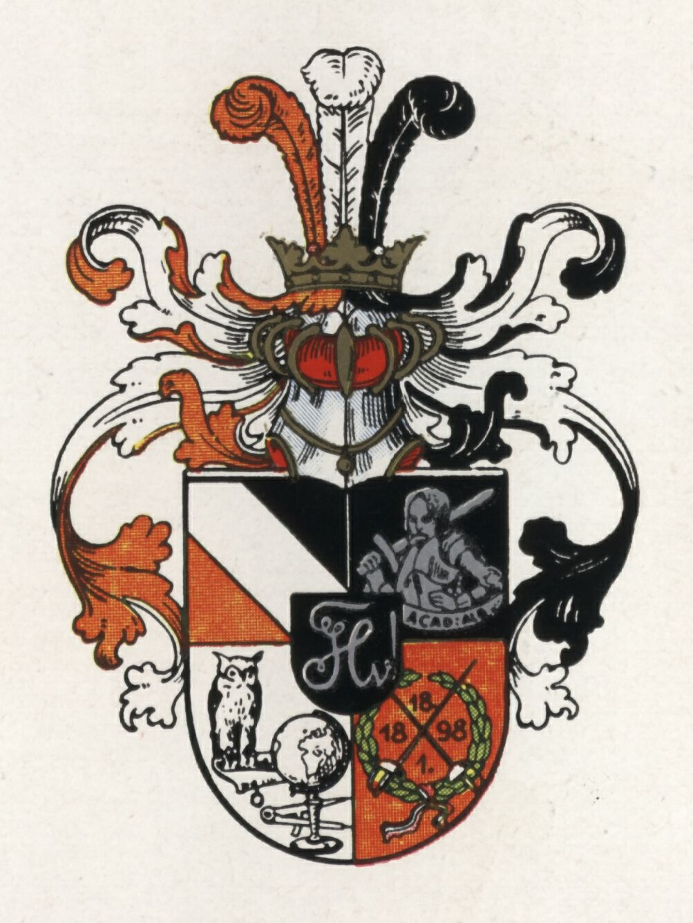 Studentenwappen der Wissenschaftlichen Verbindung Hohenstaufen Königsberg